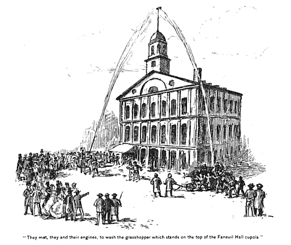 Faneuil Hall, Boston